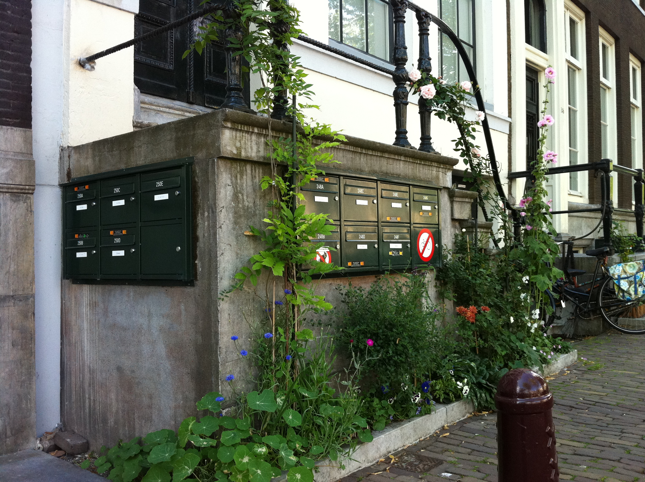 De Groote Keijser Keizersgracht 242-252 Amsterdam